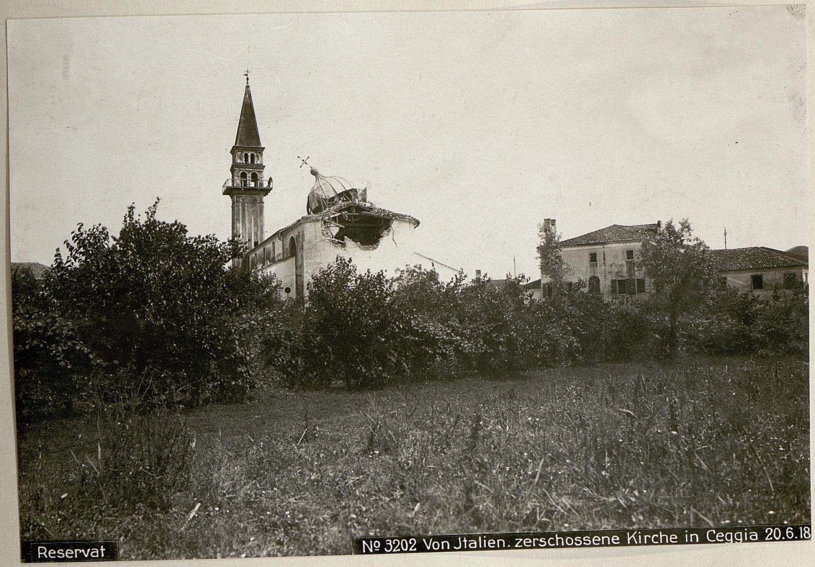 Reservat Von Italien.zerschossene Kirche in Ceggia 20.6.18.